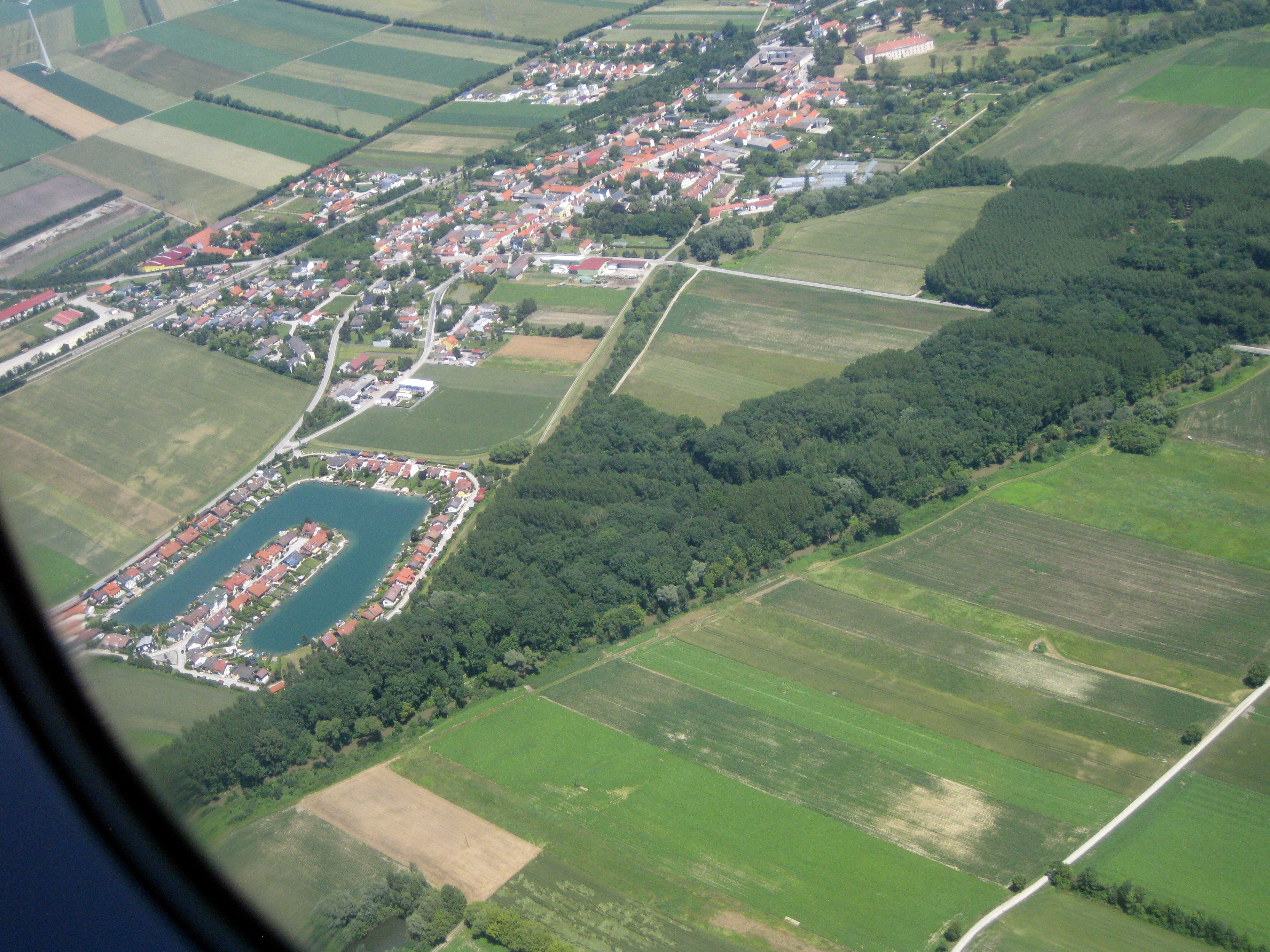 Landeanflug Flughafen Schwechat VIE